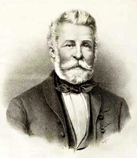 Bugát Pál (1793–1865) orvos, egyetemi tanár, akadémikus portréja. Ismeretlen művész metszete Ignaz Franz Schrecker fényképfelvétele alapján